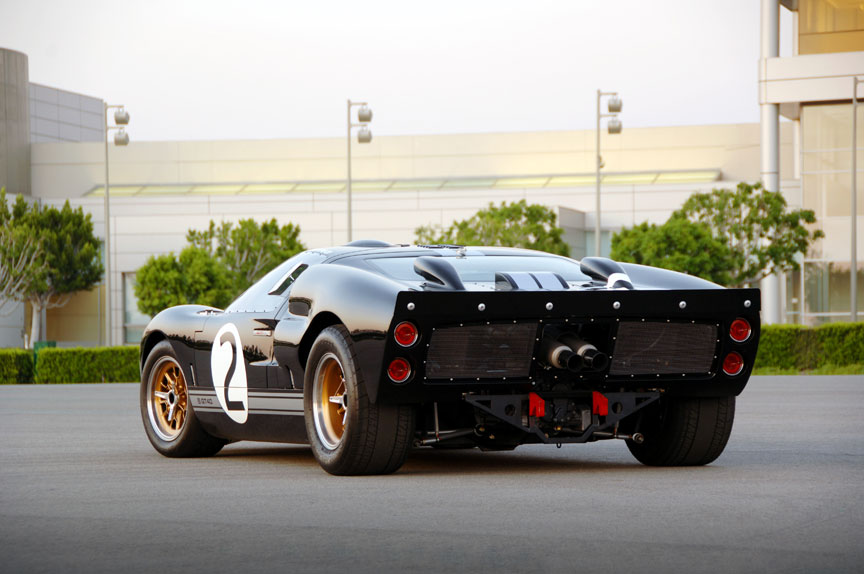 Shelby GT40 rear